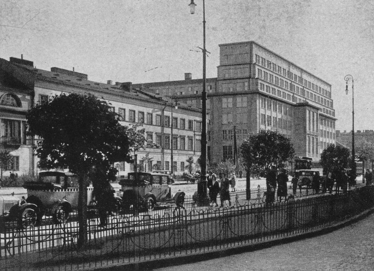 Aleja 3 Maja i gmach BGK w Warszawie